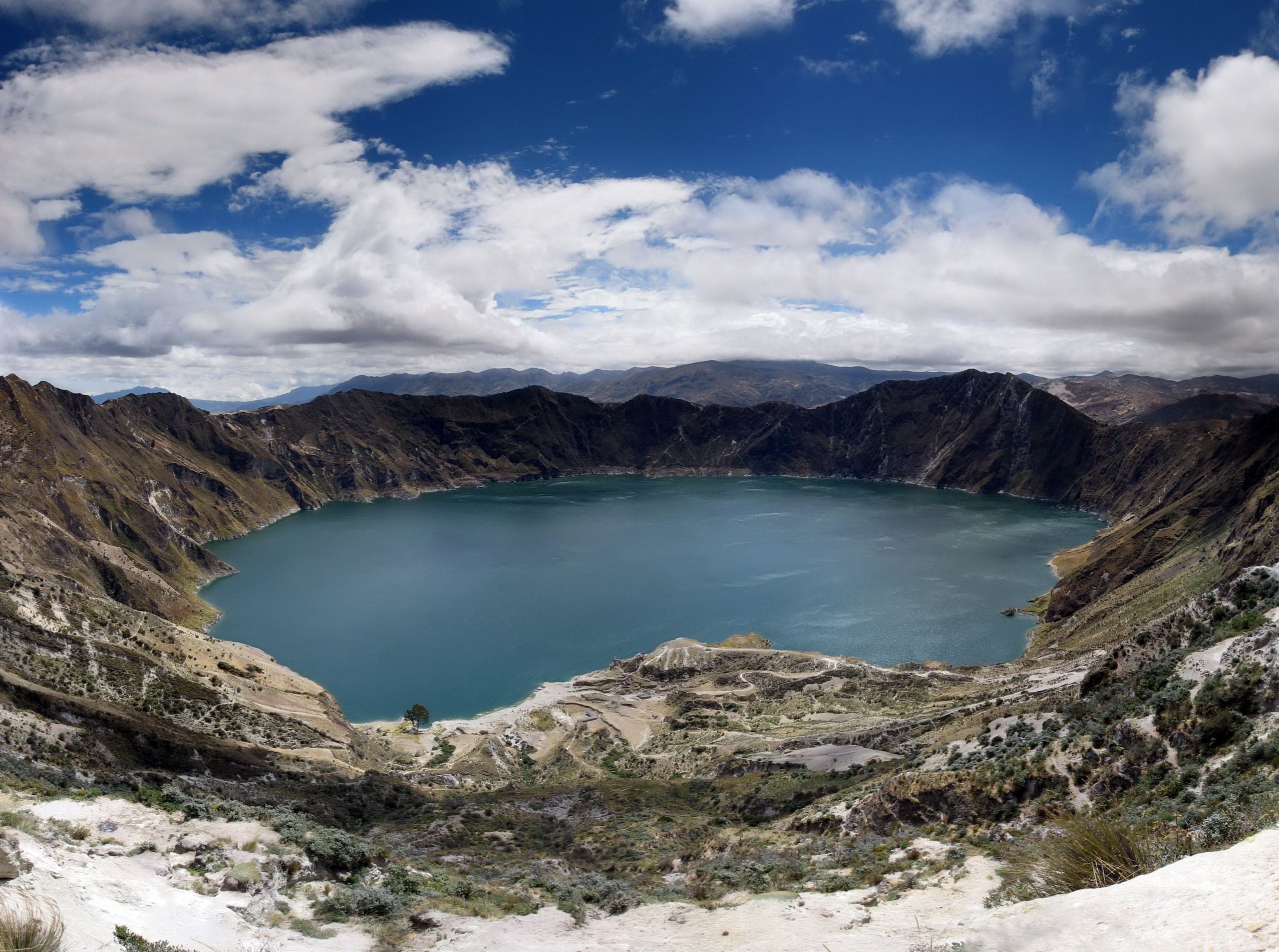 Quilotoa craterlake in Ecuador